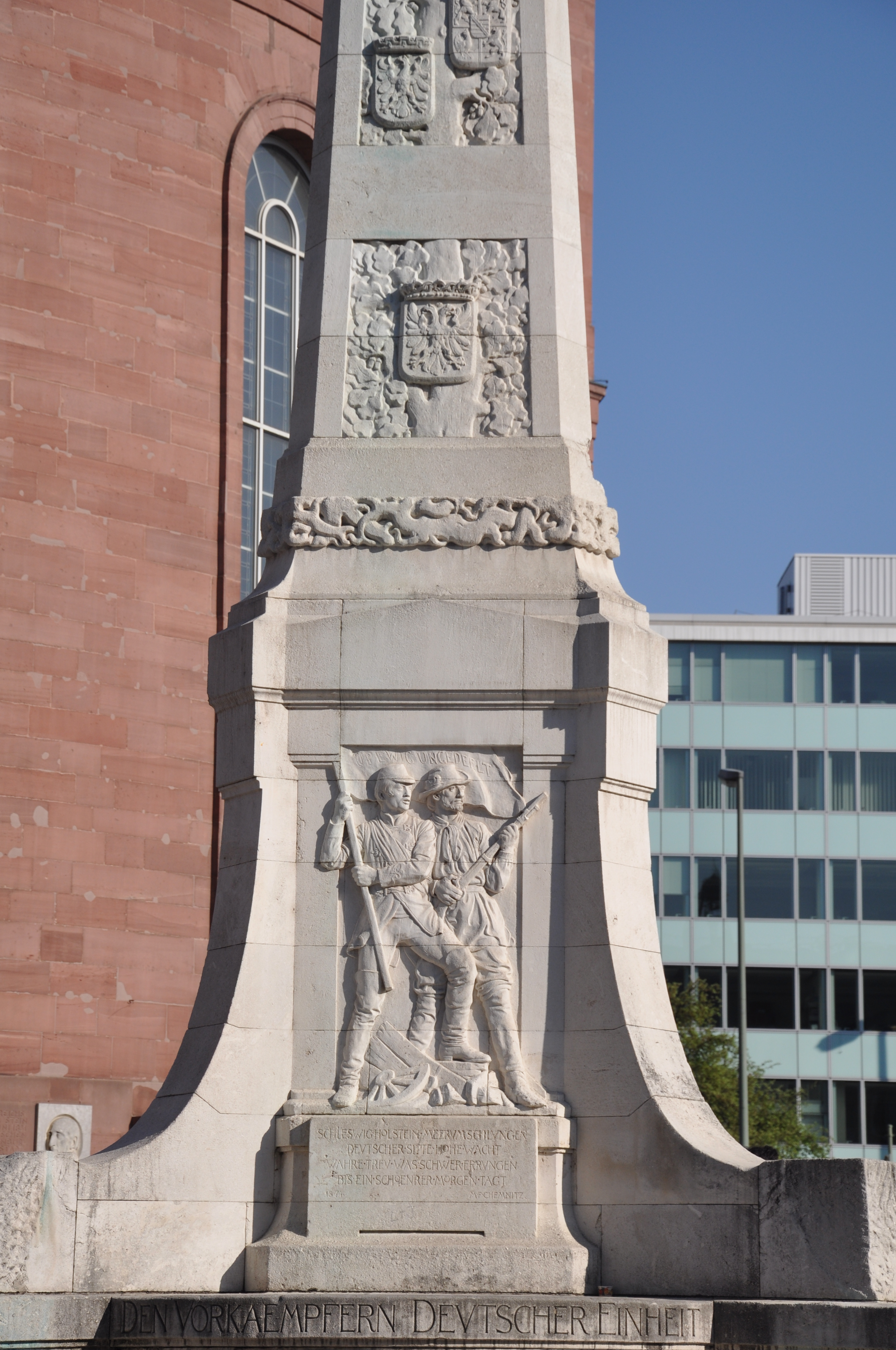 Frankfurt am Main, Einheitsdenkmal am Paulsplatz, Detail mit dem Text des Lieds „Schleswig-Holstein meerumschlungen“ (von M. F. Chmenitz)